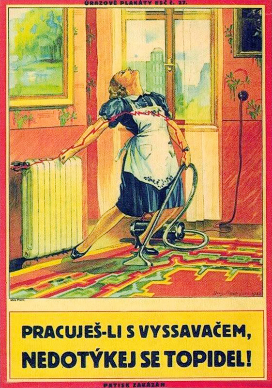 Elektrotechnický svaz československý (ESČ) vydává ve firmě Edice umělecké reklamy Jana Zieglrose sérii "Úrazové plakáty" od Ing. Š. Andrýska v počtu kolem 30.